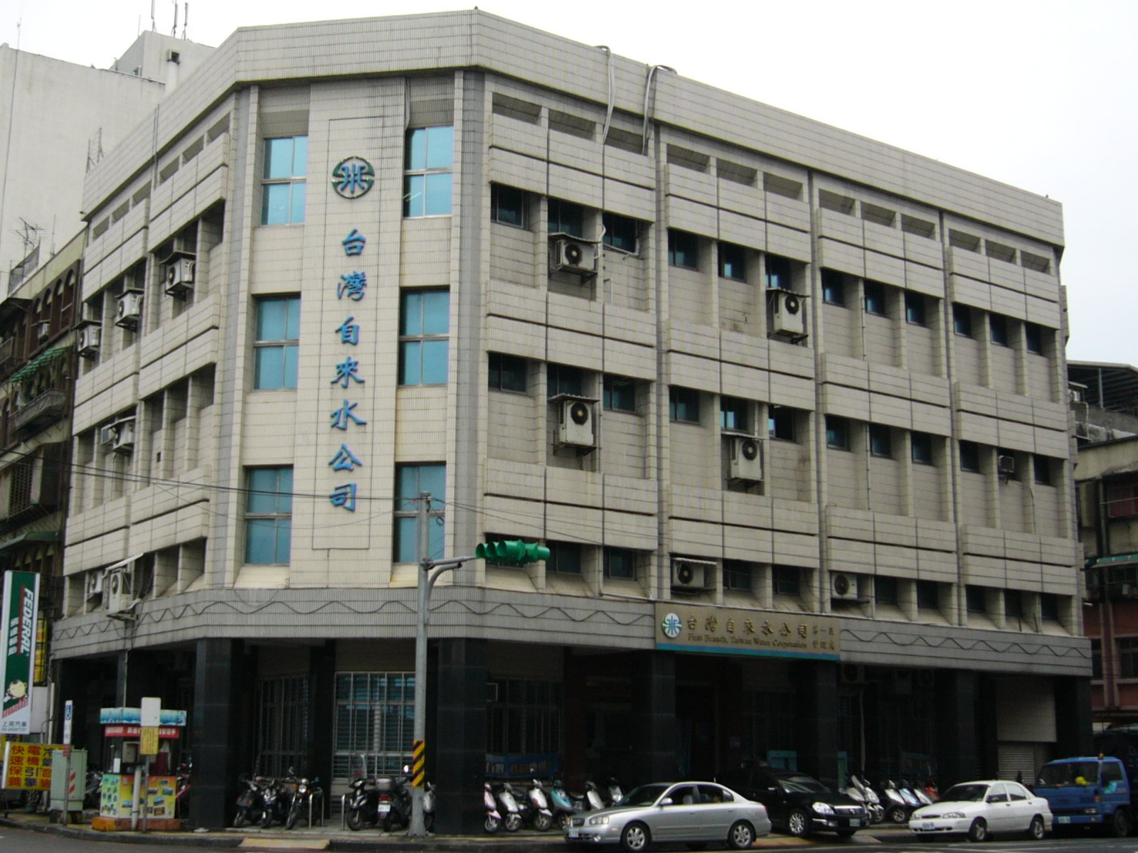 中文（台灣）: 台灣自來水公司第一區管理處大樓，位於基隆市中正區中正路106號。